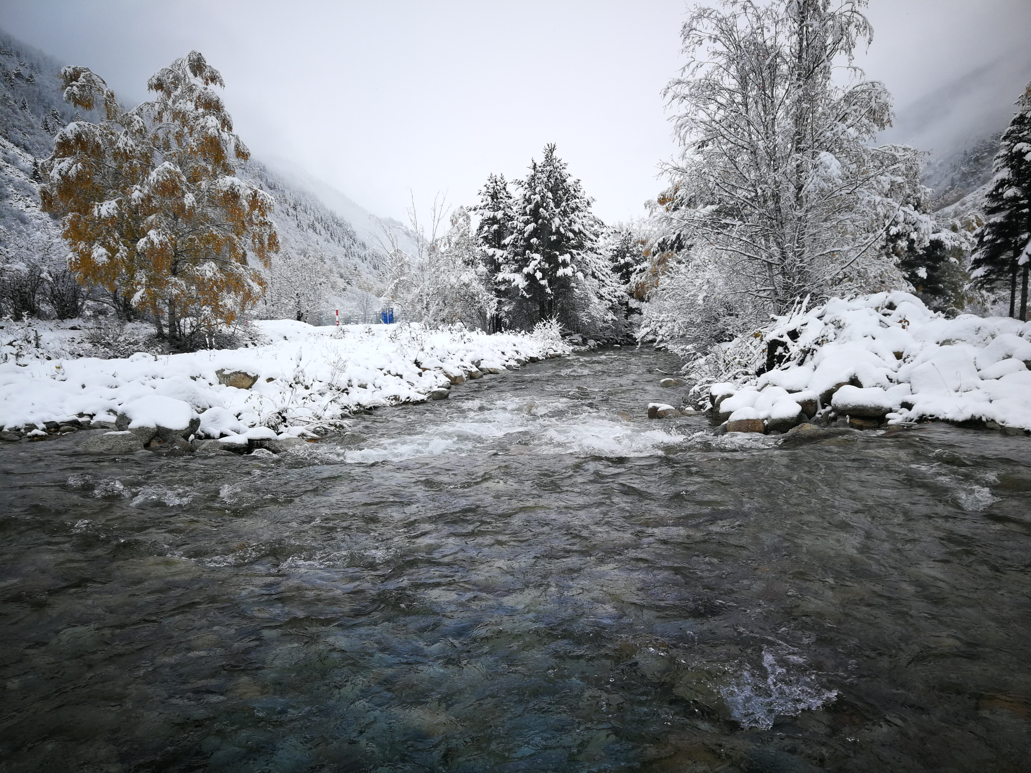 Vista del río Aiguamòg en el Valle de Arán